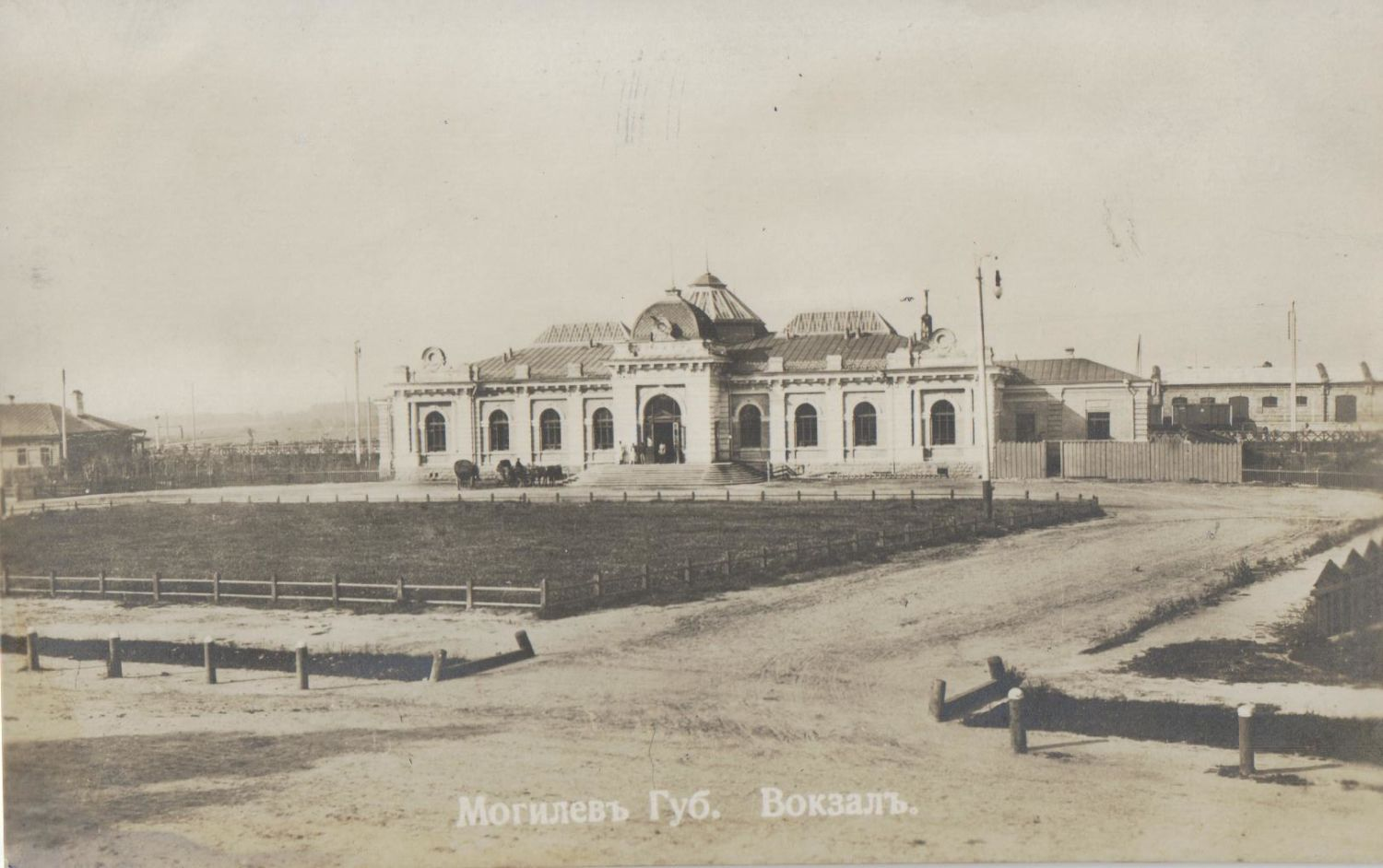 Беларуская (тарашкевіца): Магілёў (Mahiloŭ), вуліца Прывакзальная (vulica Pryvakzalnaja). Чыгуначная станцыя